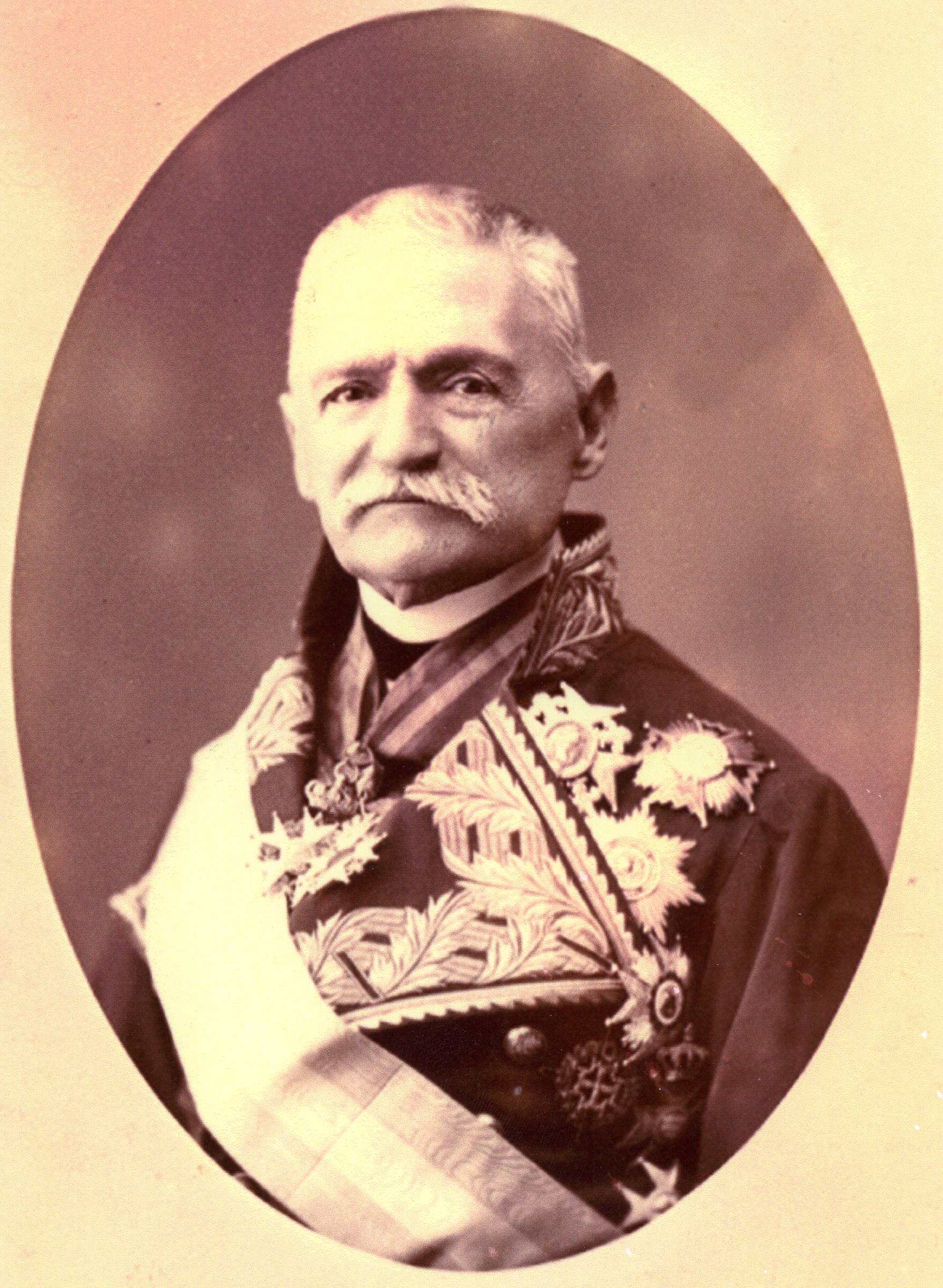 Teniente general José María Marchessi y Oleaga.